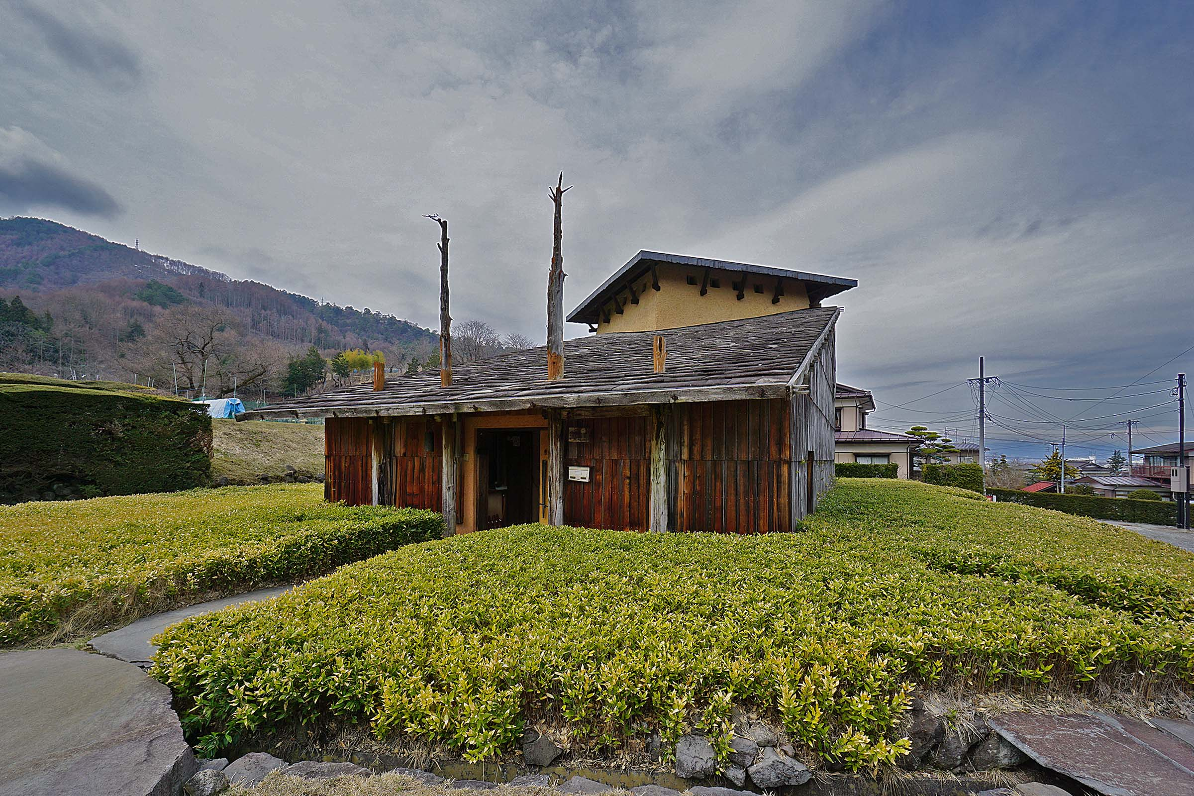 Moriya Archives museum , 神長官守矢史料館